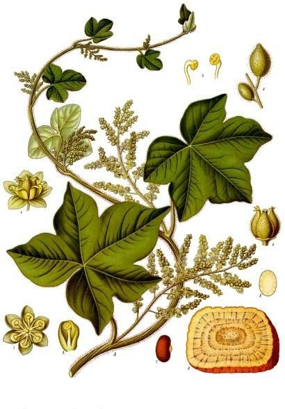 Kalumba. A männlicher Blüthenzweig, natürl. Grösse; 1 männliche Blüthe, vergrössert; 2 Kronblatt mit Staubgefäss, desgl.; 3 Staubgefässe, desgl.; 4 weibliche Blüthe (nach Bot. Mag.), desgl.; 5 Stempel, desgl.; 6 Früchte, natürl. Grösse; 7 Same, desgl.; 8 derselbe zerschnitten, desgl.; 9 Wurzelquerschnitt, desgl.